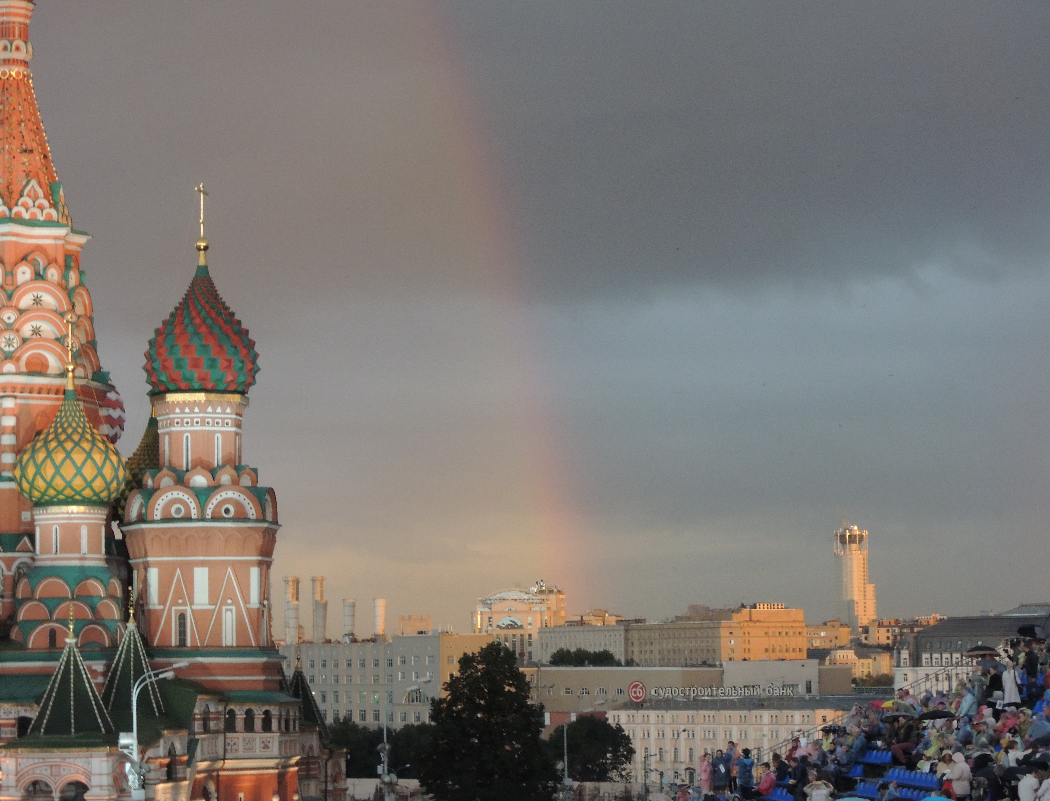 Спасская башня (фестиваль)